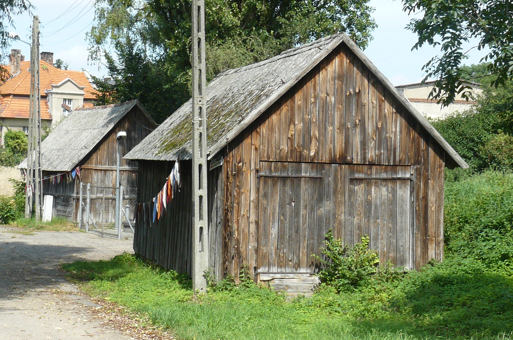 Domy rybaków. Chrzypsko Wielkie.